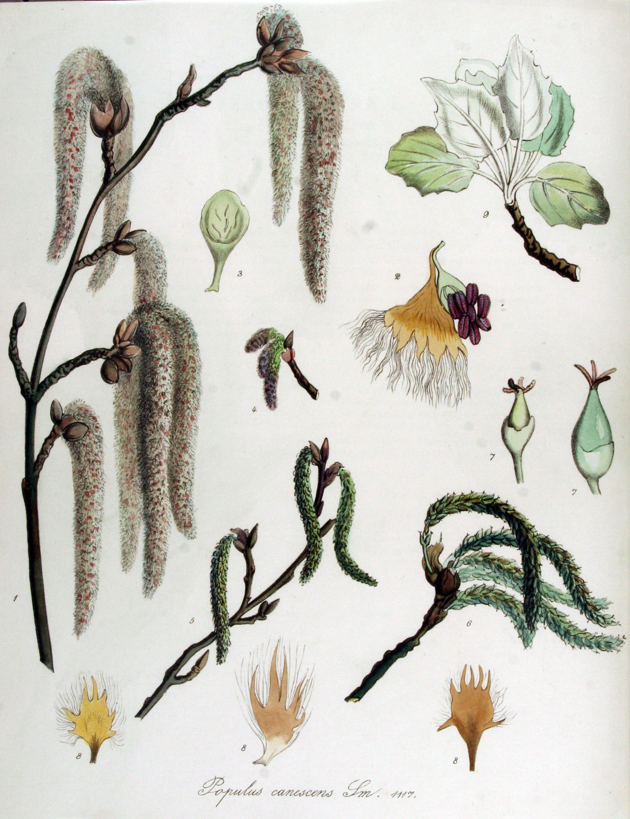 Populus ×canescens (Ait.) Smith